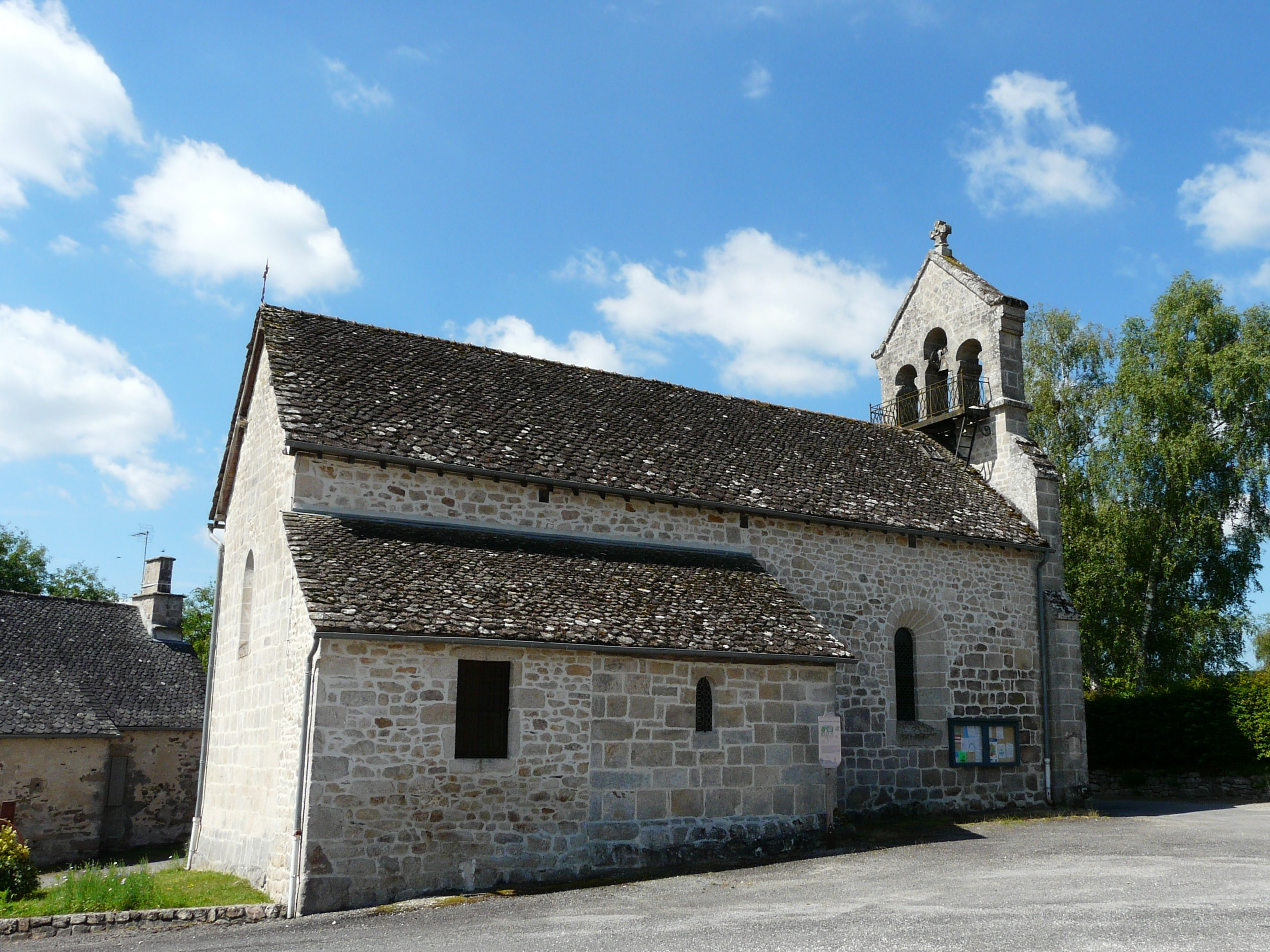 L'église Saint-Bonnet de Saint-Bonnet-les-Tours-de-Merle, Corrèze, France.